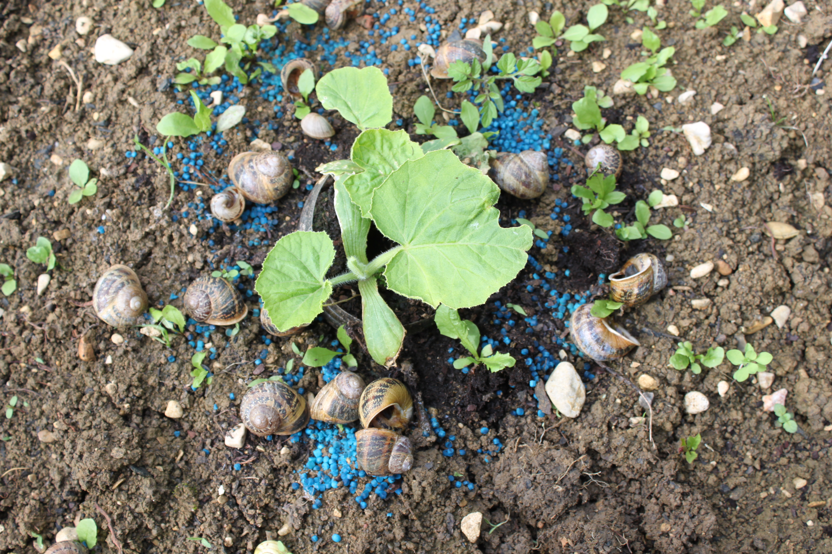 Anti-Limces